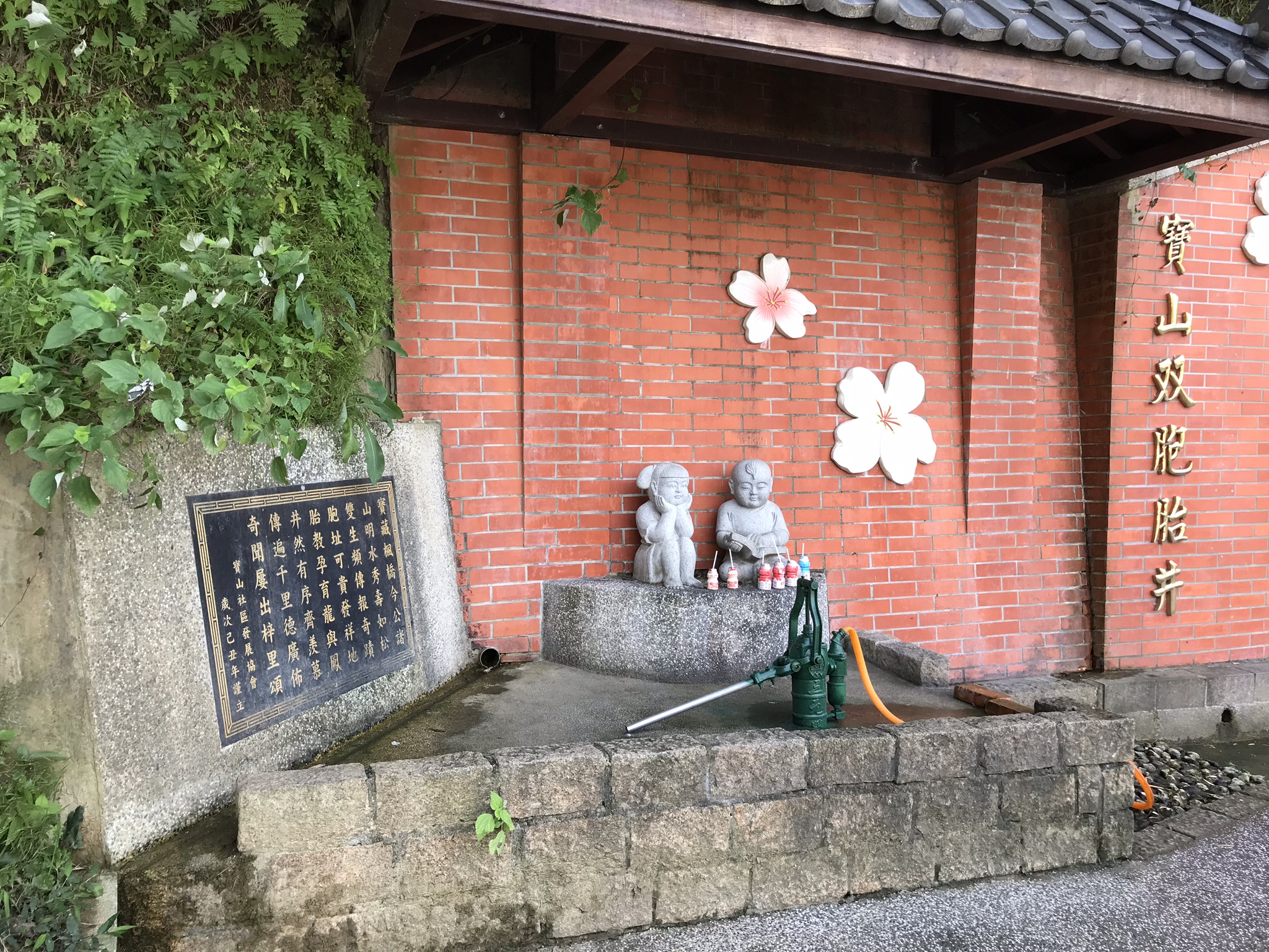 中文（台灣）: 寶山雙胞胎井